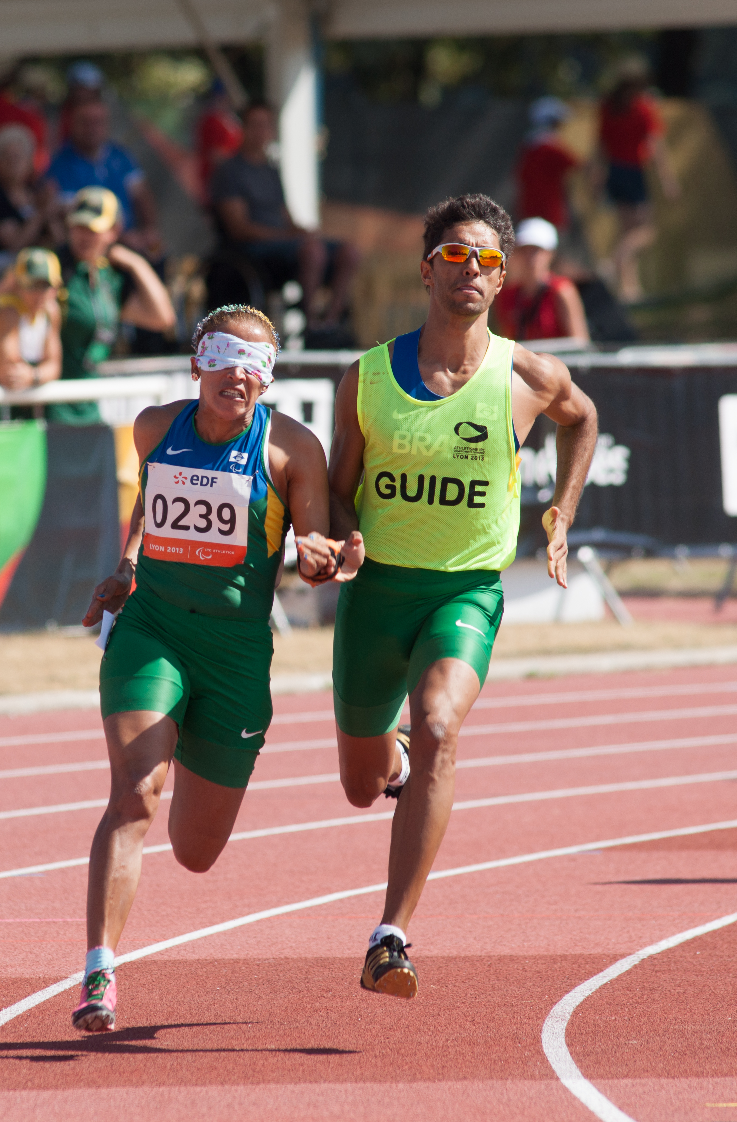 Championnats du monde d'athlétisme IPC 2013.